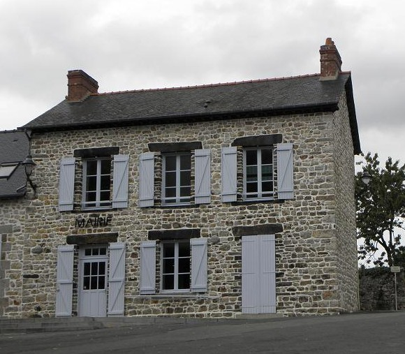 Mairie de Montautour (35).